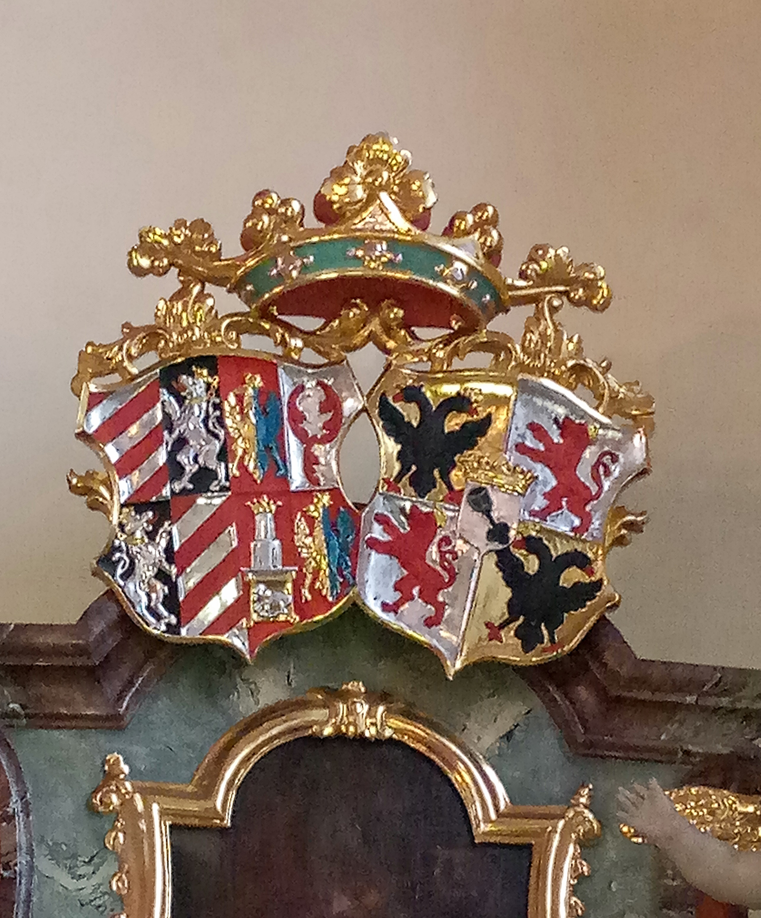 Allianzwappen der Gräfin Therese Wilhelmine von Pollheim-Winkelhausen (+1757), rechter Seitenaltar, kath. Kirche St. Pancratius, Schwetzingen